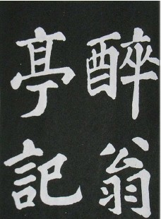 苏轼书《醉翁亭记》